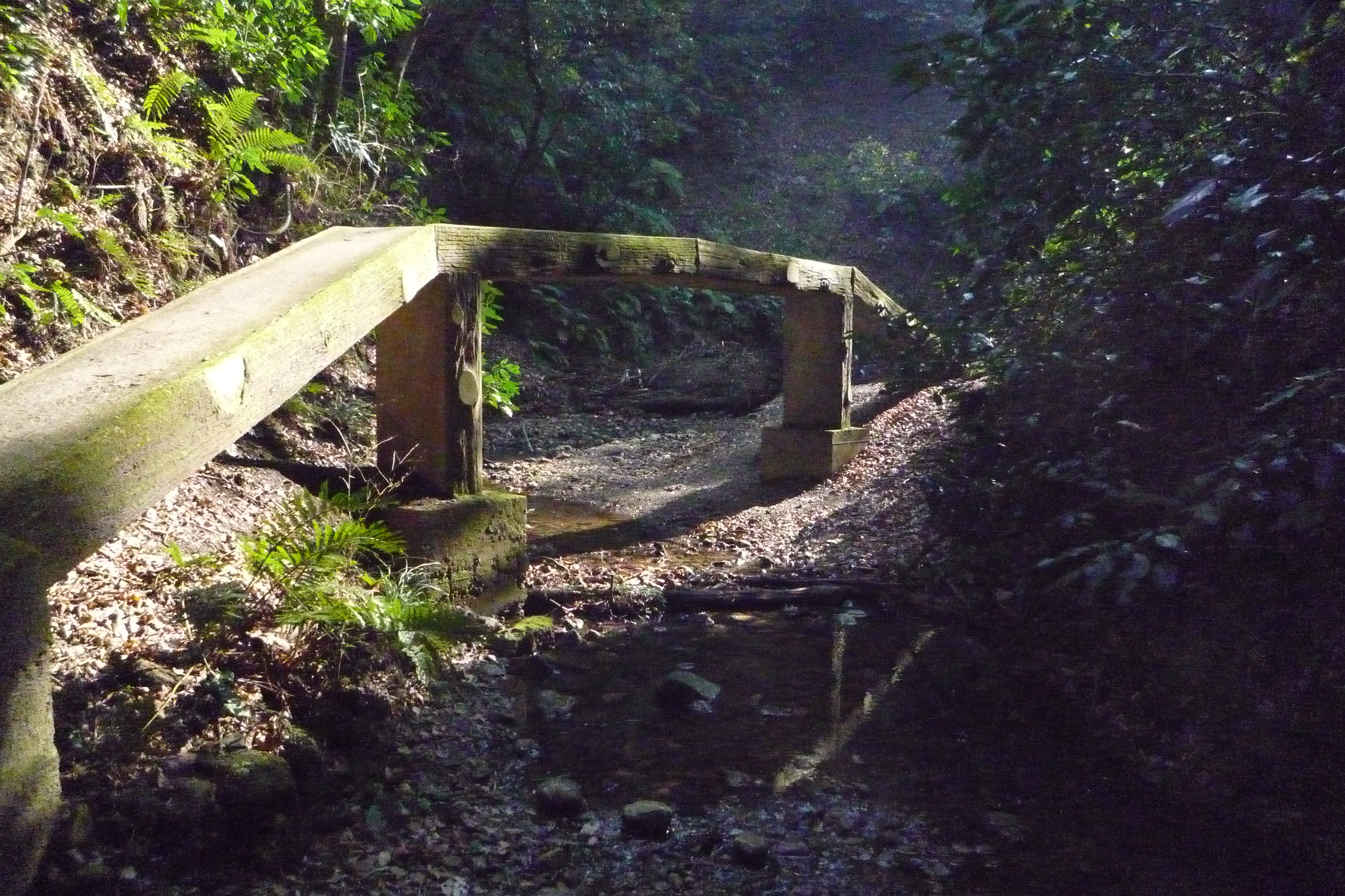 平作川上流の画像